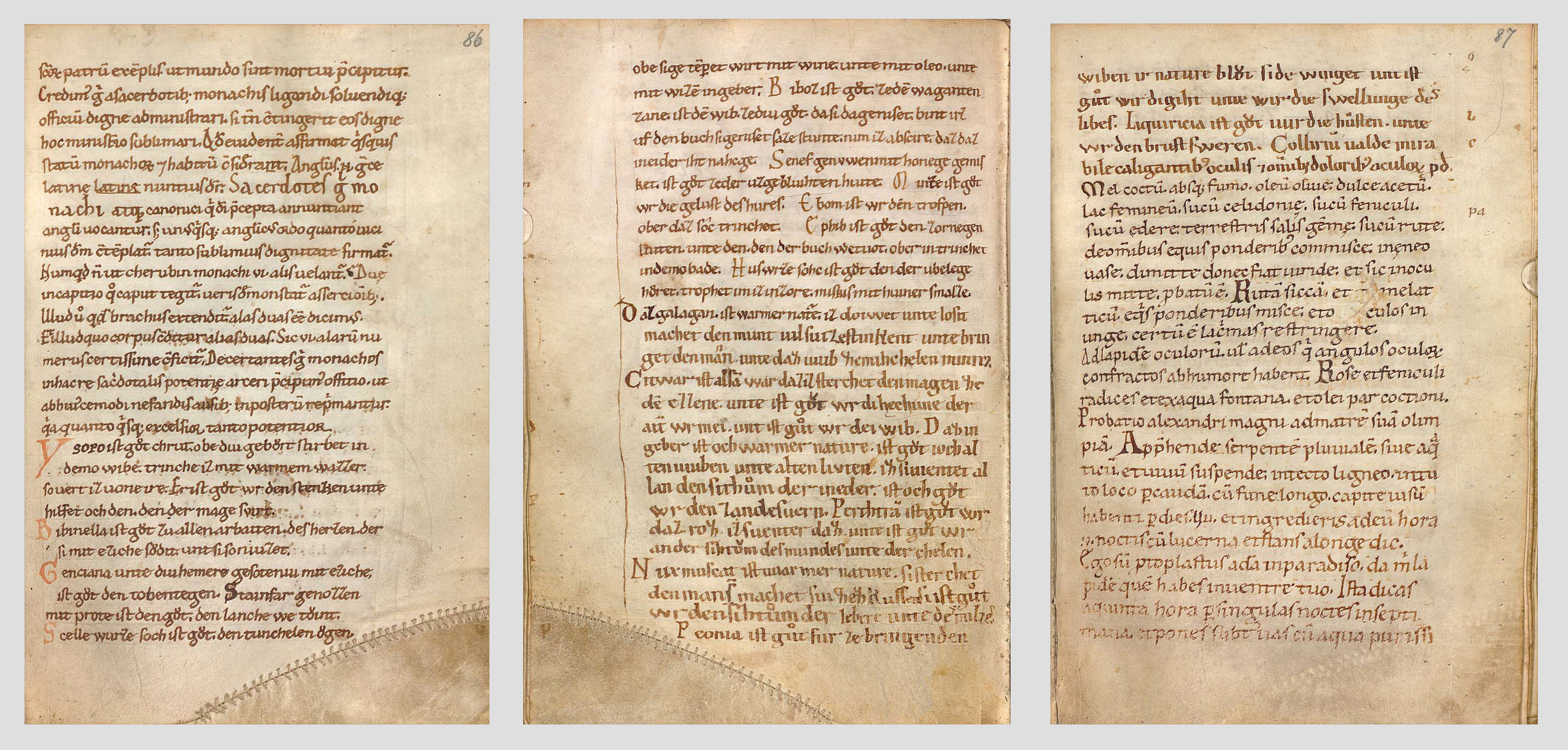 Prüller Kräuterbuch